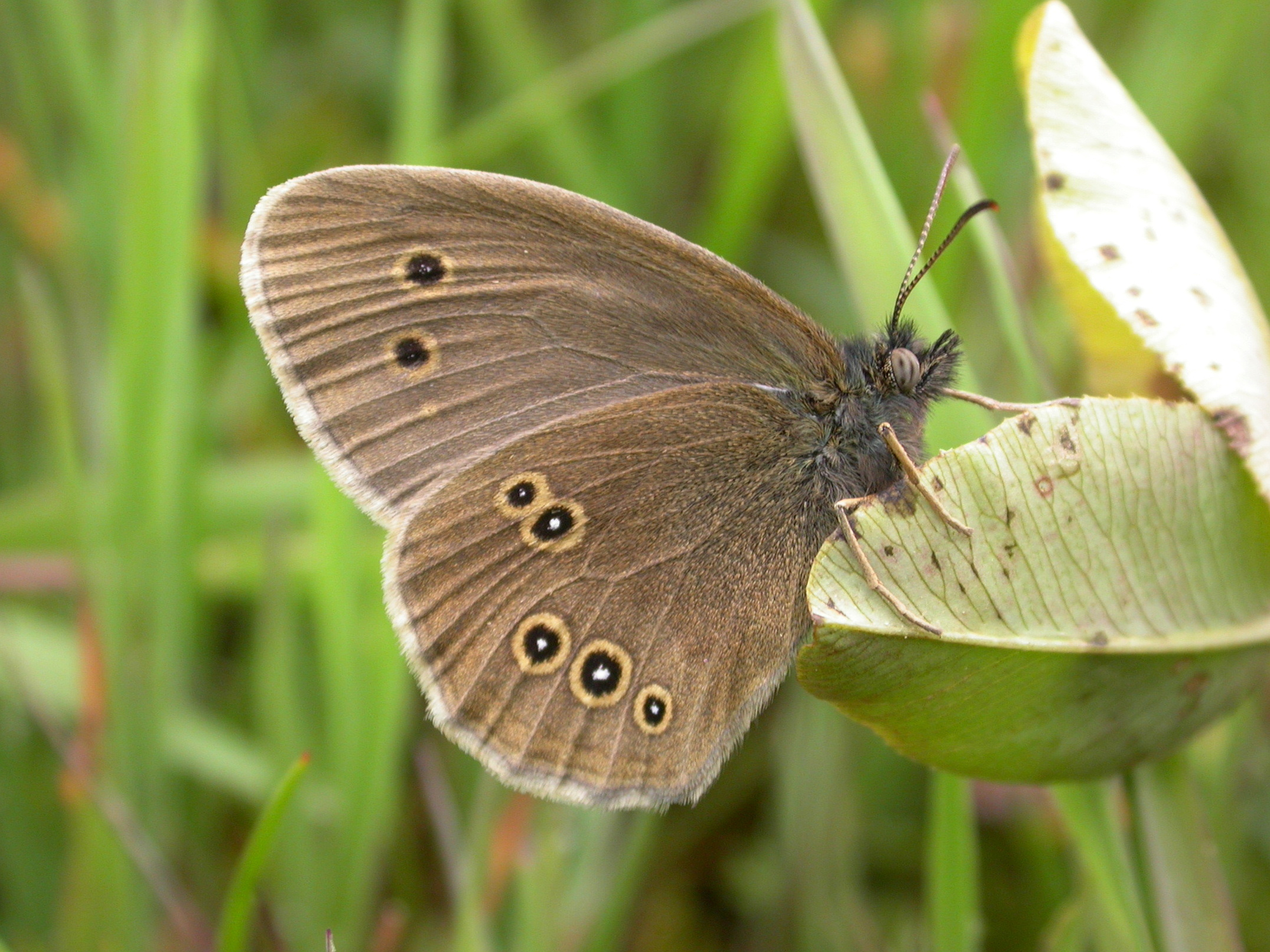 Aphantopus hyperantus (Nymphalidae, Satyrinae). Les Ponts-de-Martel, Suisse.